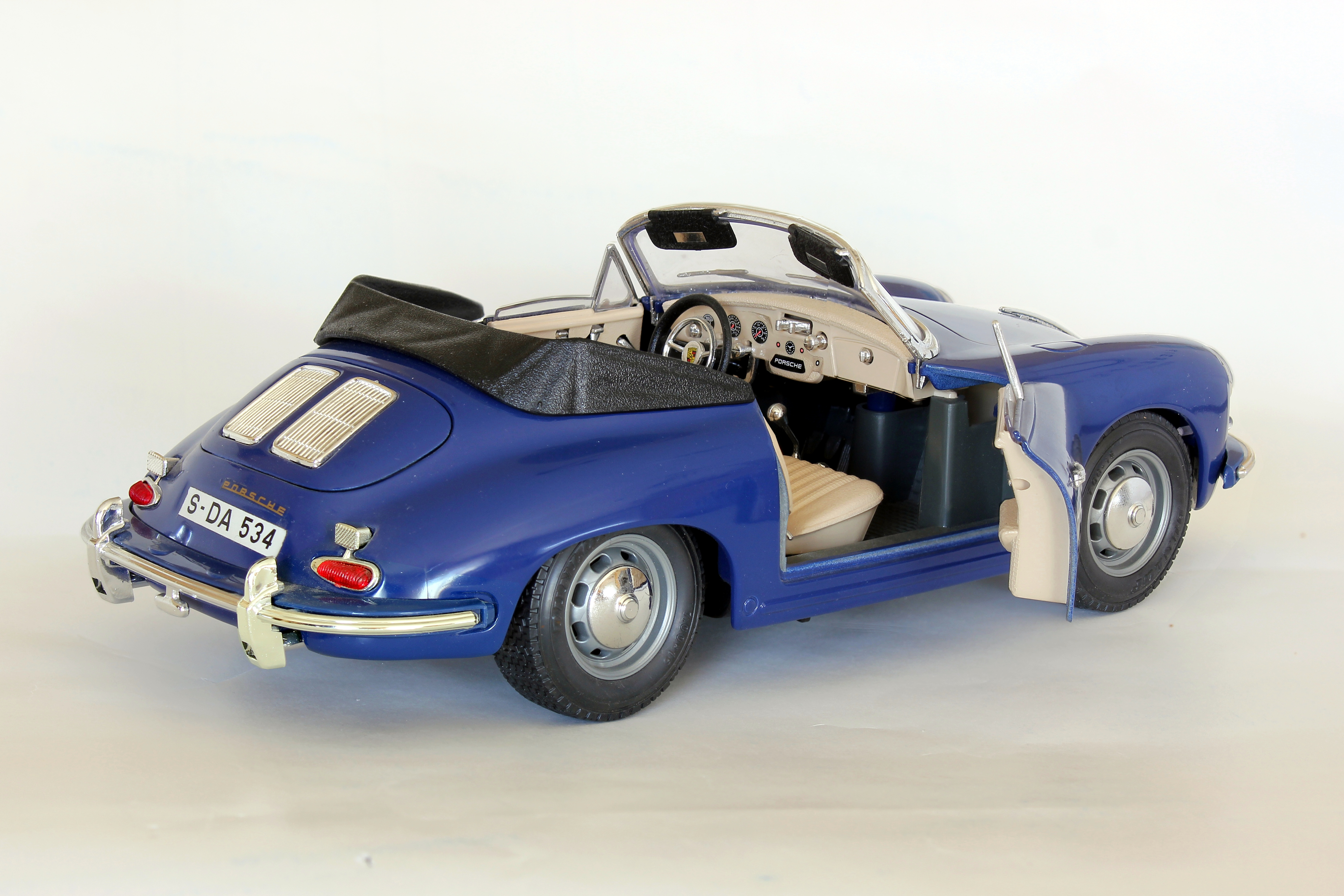 Modell eines Porsche 356 B, Baujahr 1961, von Bburago, Maßstab 1 : 18.